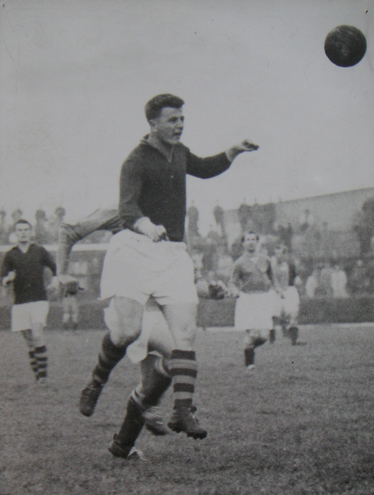 Ing. Steiner v drese Tankista Praha 1950